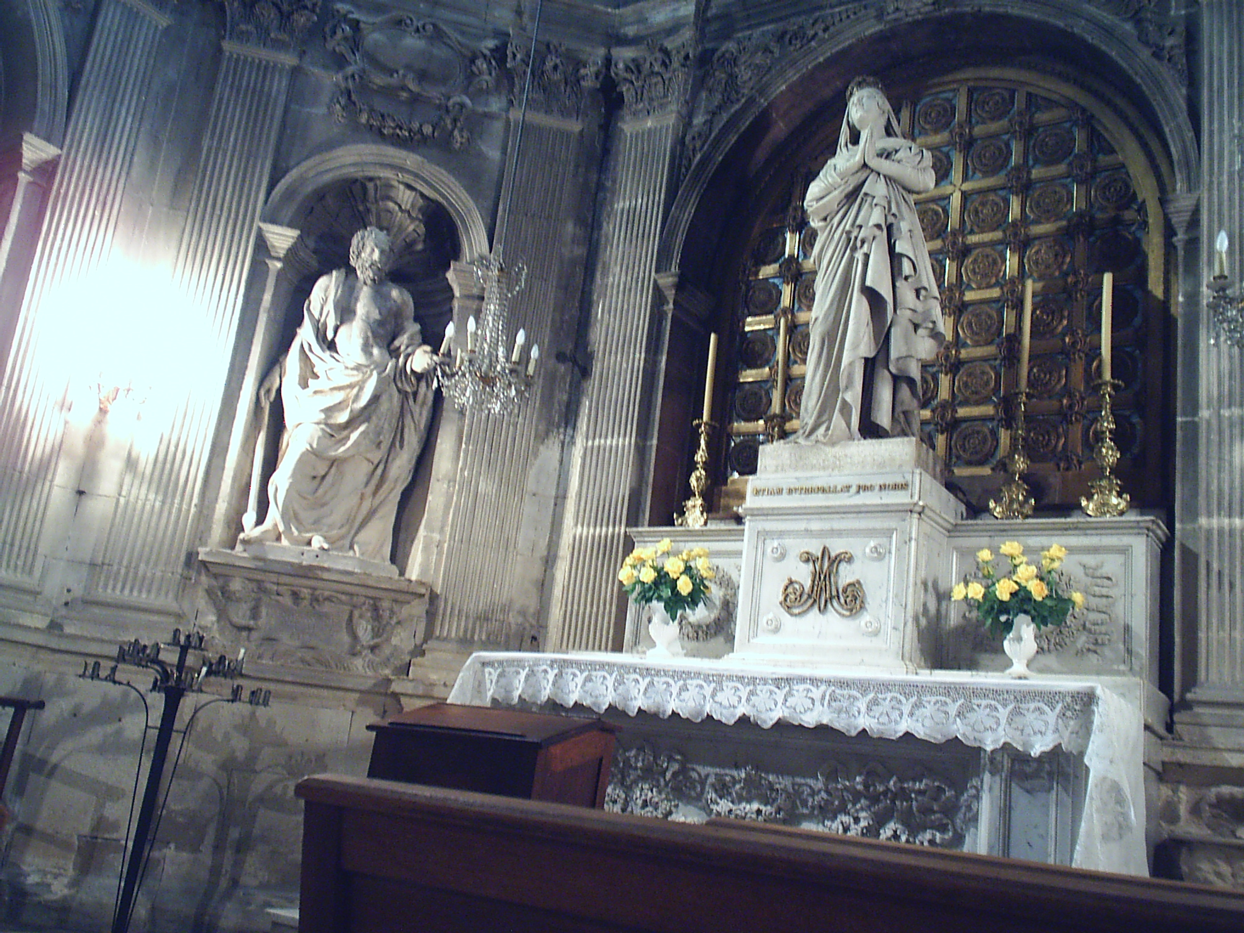 Statue de Notre-Dame-des-Doms sculptée par James Pradier en 1838. Chapelle de la Résurrection. Métropole Notre-Dame-des-Doms en Avignon (84). .